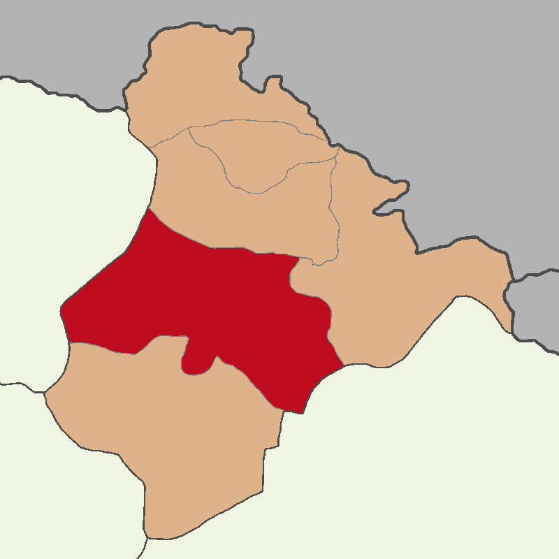 Ardahan Merkez ilçesinin konumu